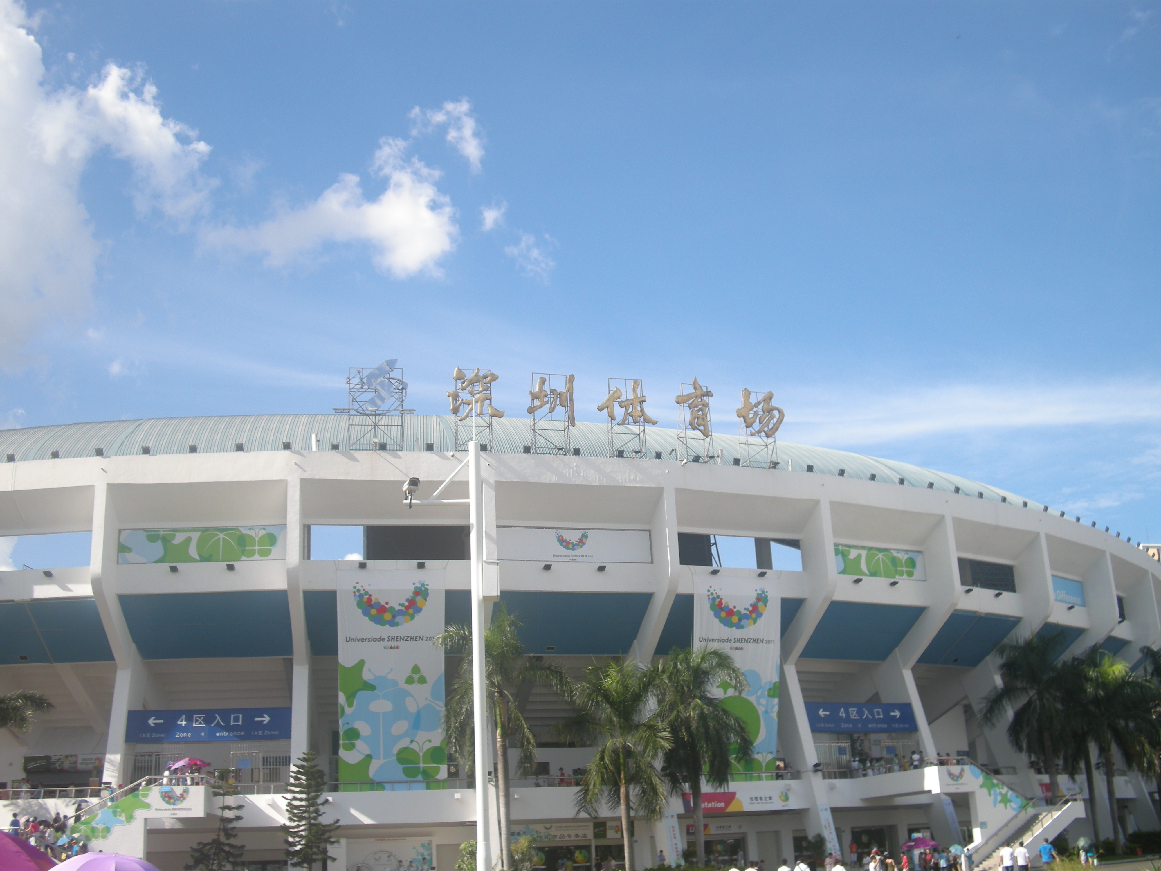 深圳体育场的照片